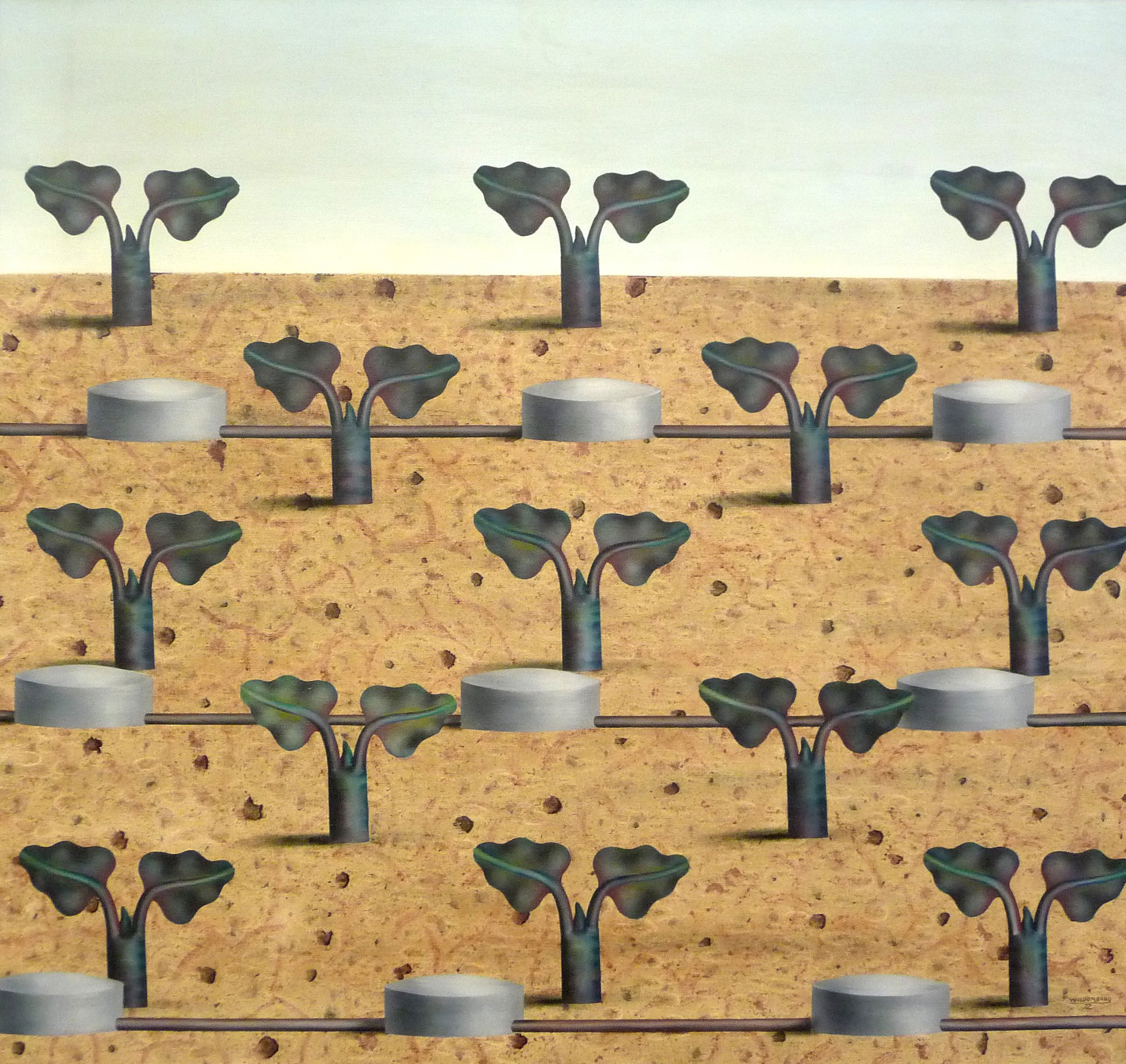 Hermann Waldenburg, Wassertanks, 1972, Öl auf Leinen, 92 x 99 cm, Sammlung Jaeschke